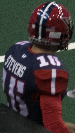 Valor 47 / Philadelphia Soul 48